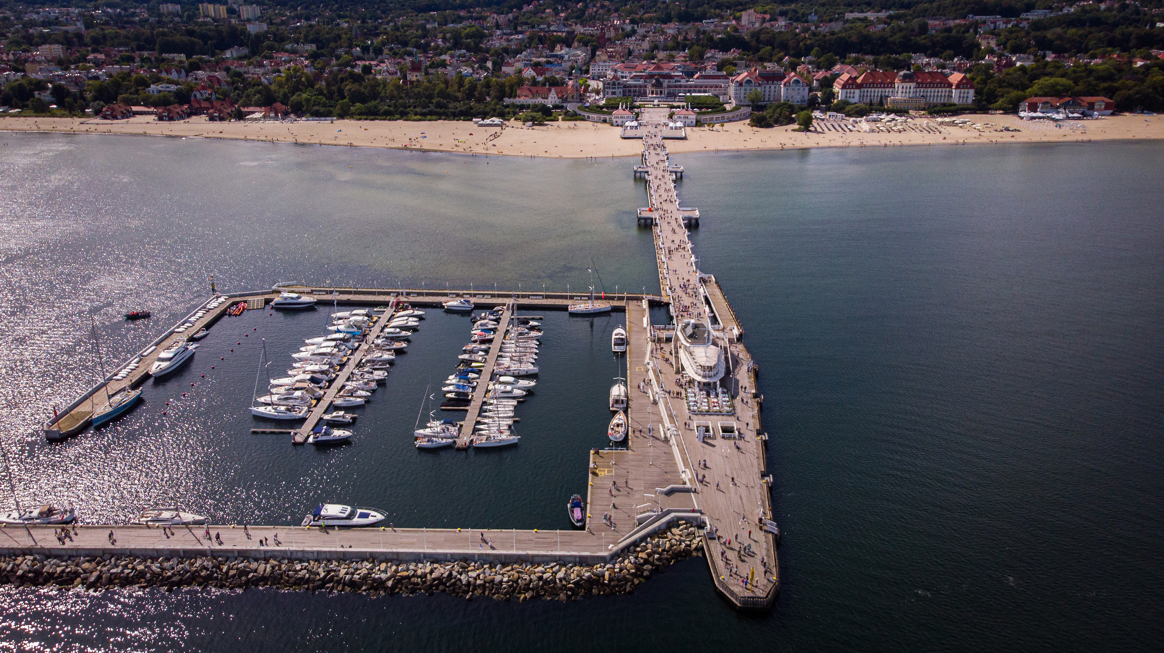 Sopot, Molo w Sopocie